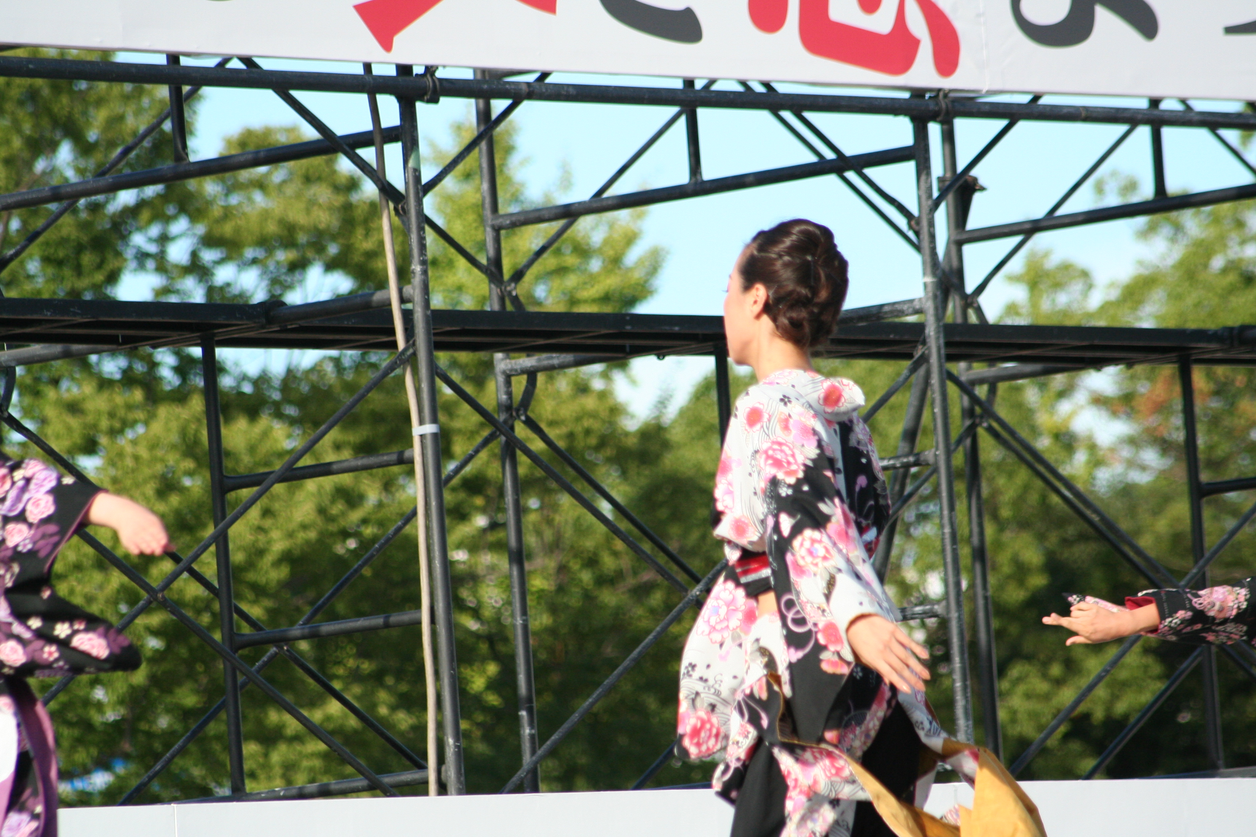 2010年8月8日。兵庫県姫路市にて姫路お城まつりとともに同時開催された「第11回ひめじ良さ恋まつり」の写真。よさこい踊りは各チームごとにそのチーム独自の踊りを披露する。2010年の祭参加チームは42組。